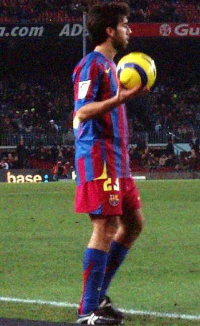 Camp Nou, F.C Barcelona vs Celta de Vigo. Final score: 2 - 0